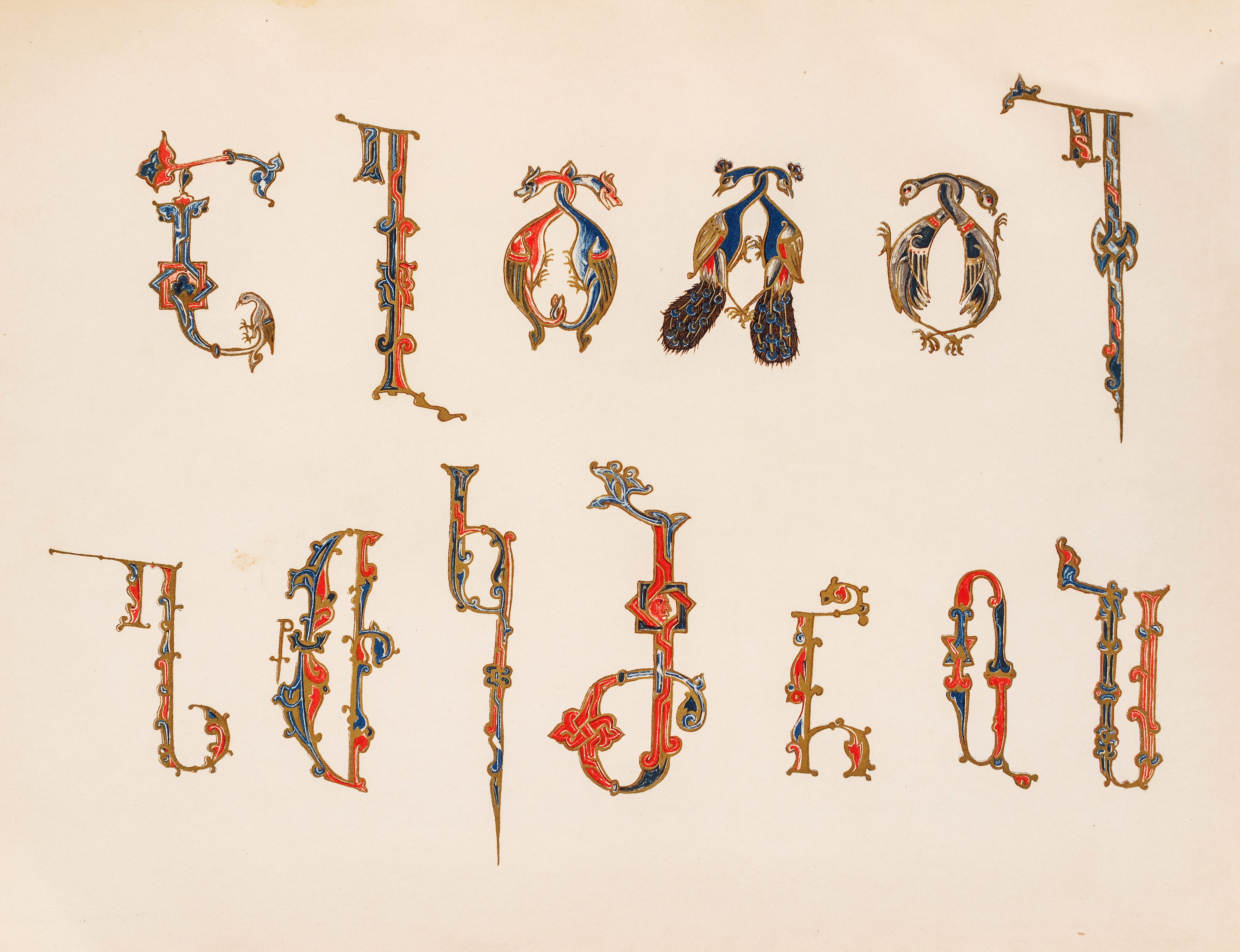 ასომთავრული საზედაო, მხატვრული ასოები. ხელნაწერიდან მოქვის ოთხთავი. 1300 წელი